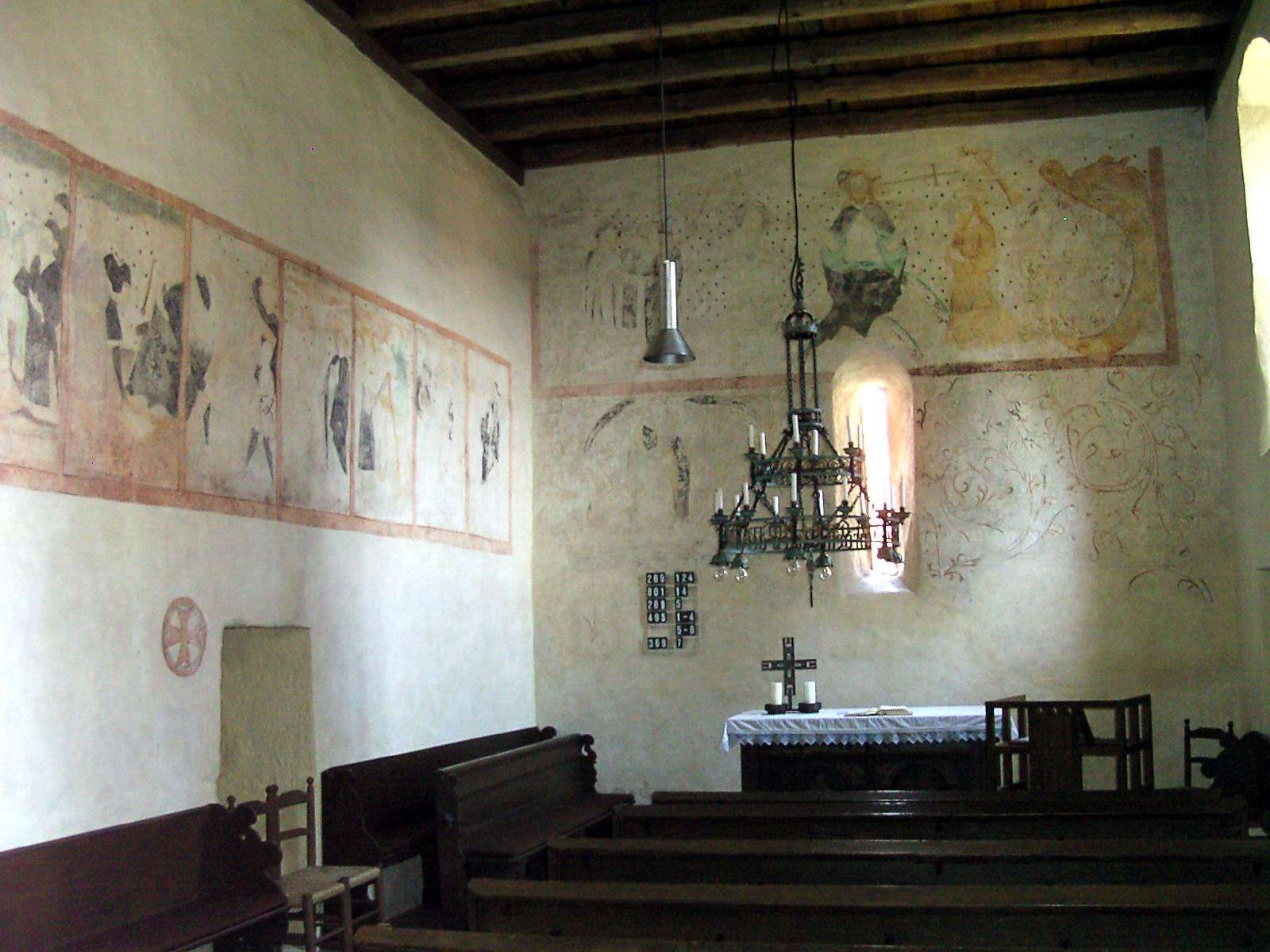 In der Seckendorfer Burgkapelle